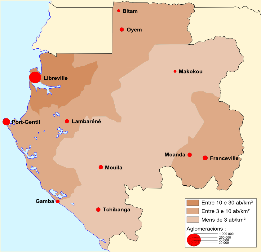 Demografia de Gabon